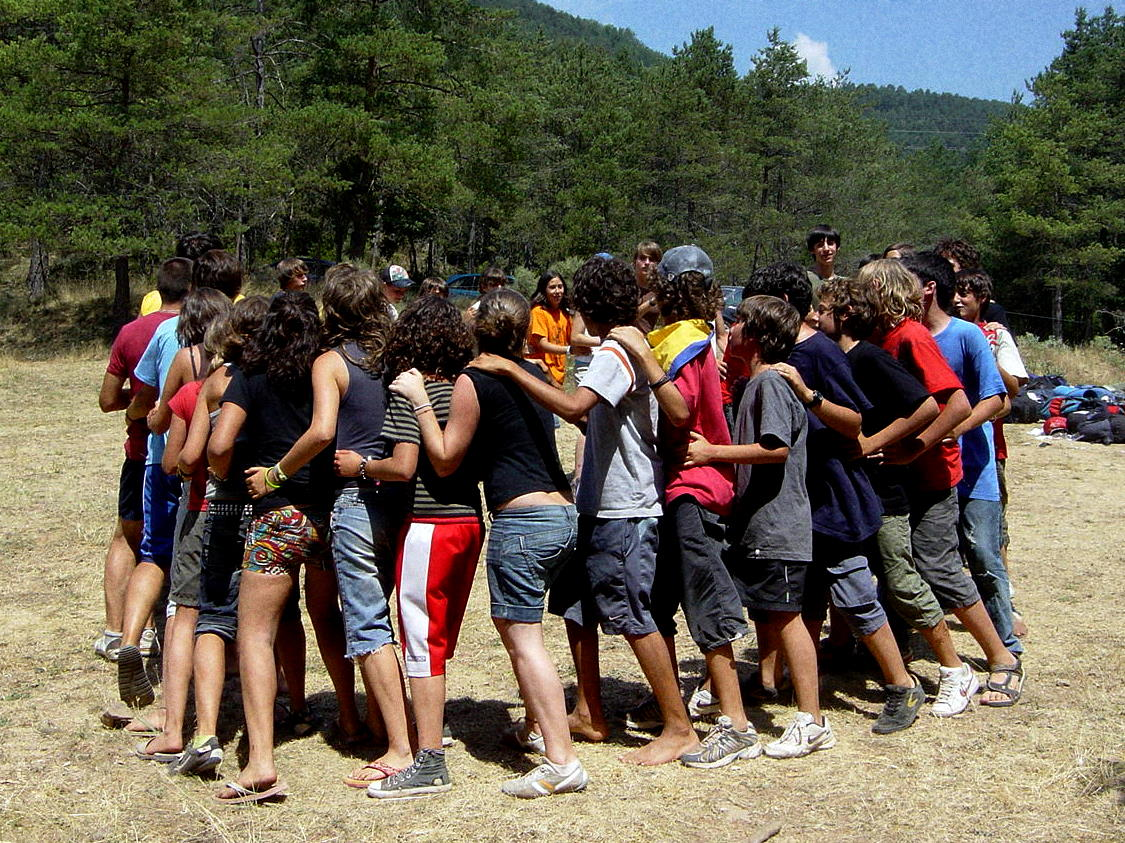 Activitat d'un dels casals d'estiu de la Fundació Esplai Girona